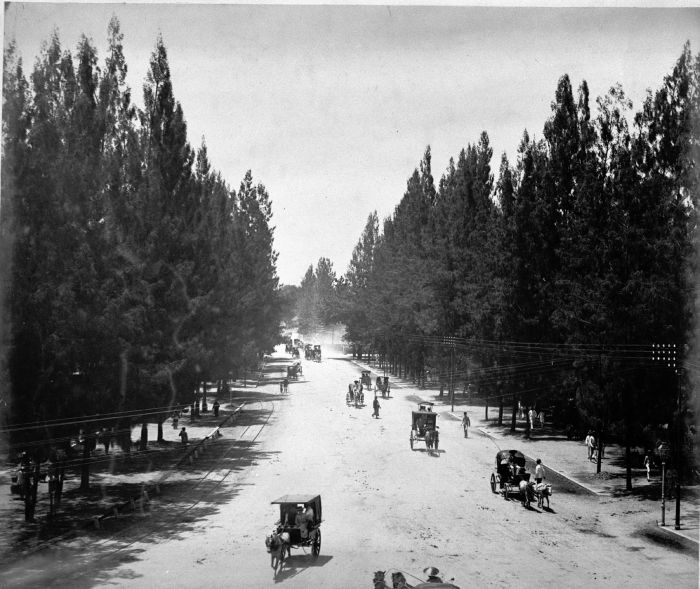 Foto. Straatgezicht met rijtuigen, Pasar Besar, Soerabaja